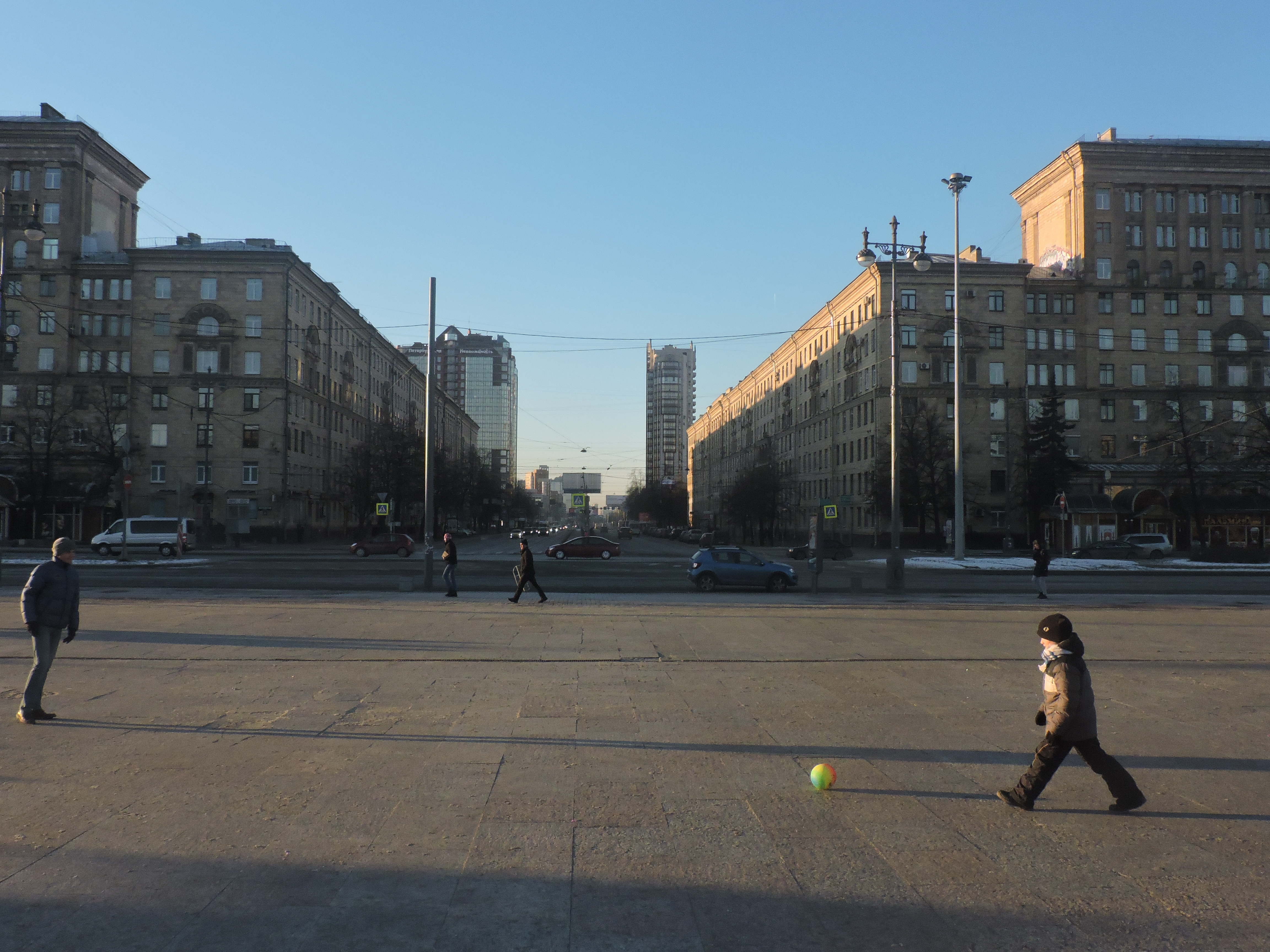 Конец Ленинского проспекта